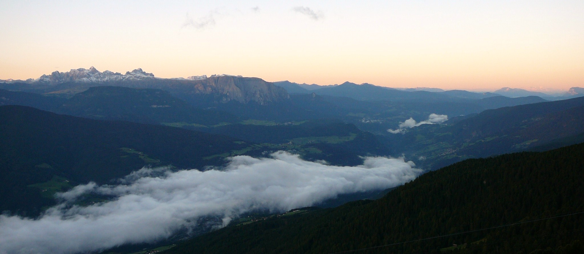 L'alba vista dal Rodella, sulla valle Isarco